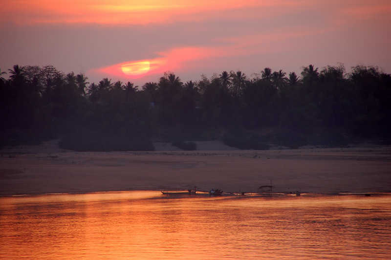 Kratie, Cambodia